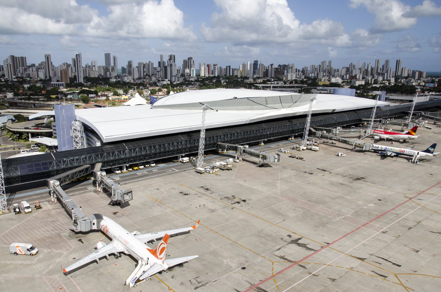 Aeroporto Internacional de Guararapes (Gilberto Freyre em Recife, Pernambuco, Brasil.